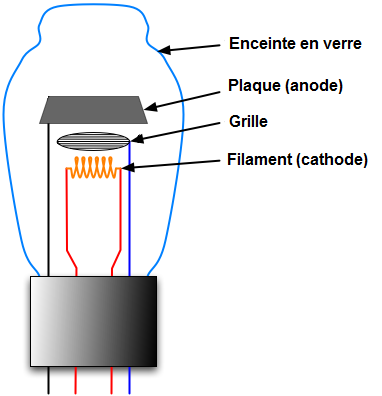 Schéma d'un tube à vide triode, adaptation en français de la figure Triode vacuum tube.png dessinée par user:Mako098765.